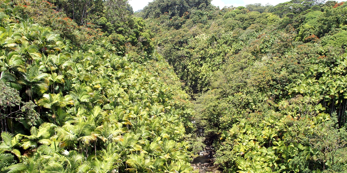 Иллюcтрация для викиуебника Гавайеведение